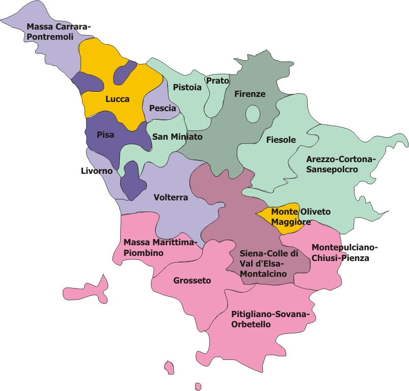 Mapa de la regió eclesiàstica de la Toscana